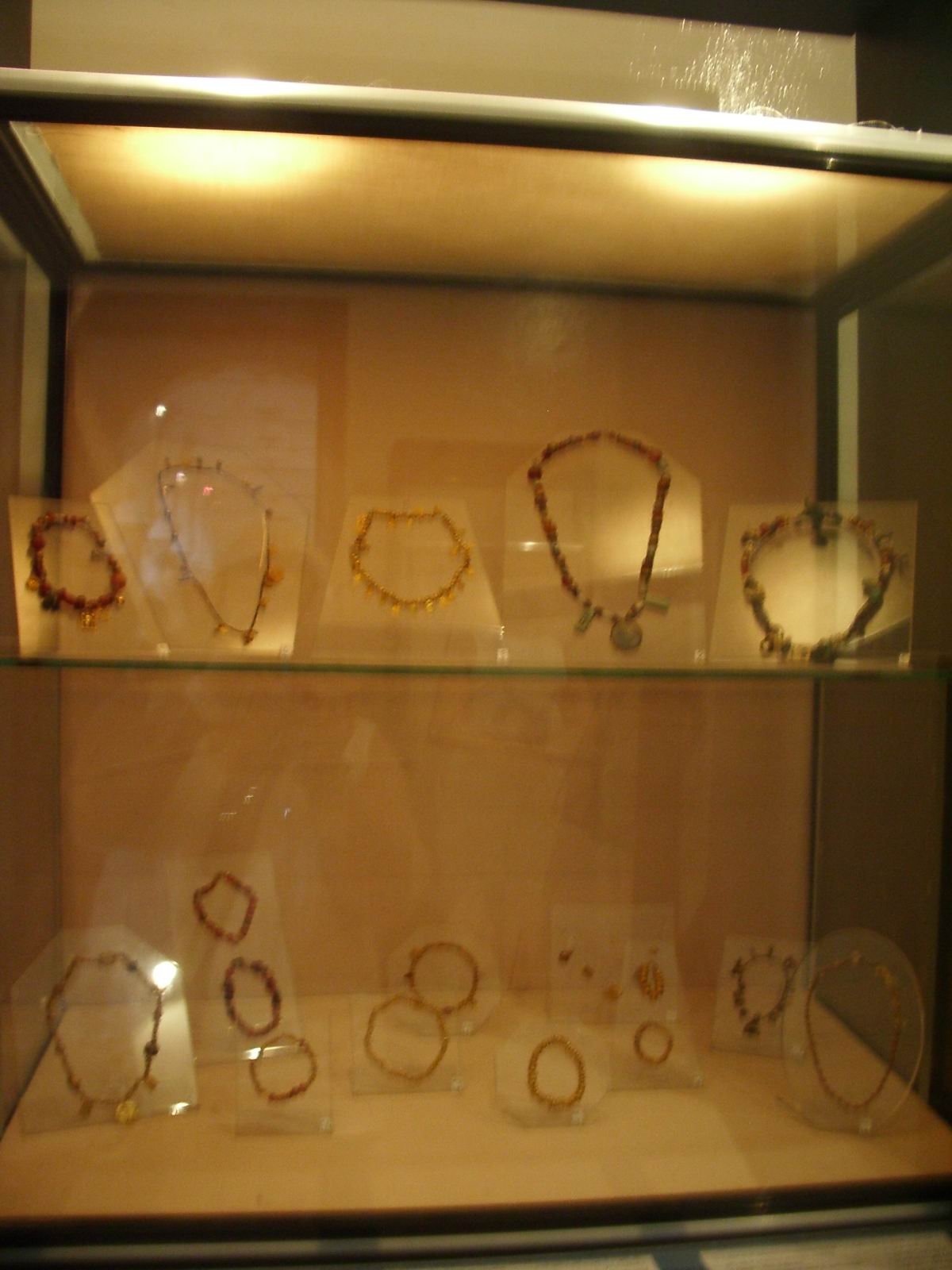 joies al Bardo